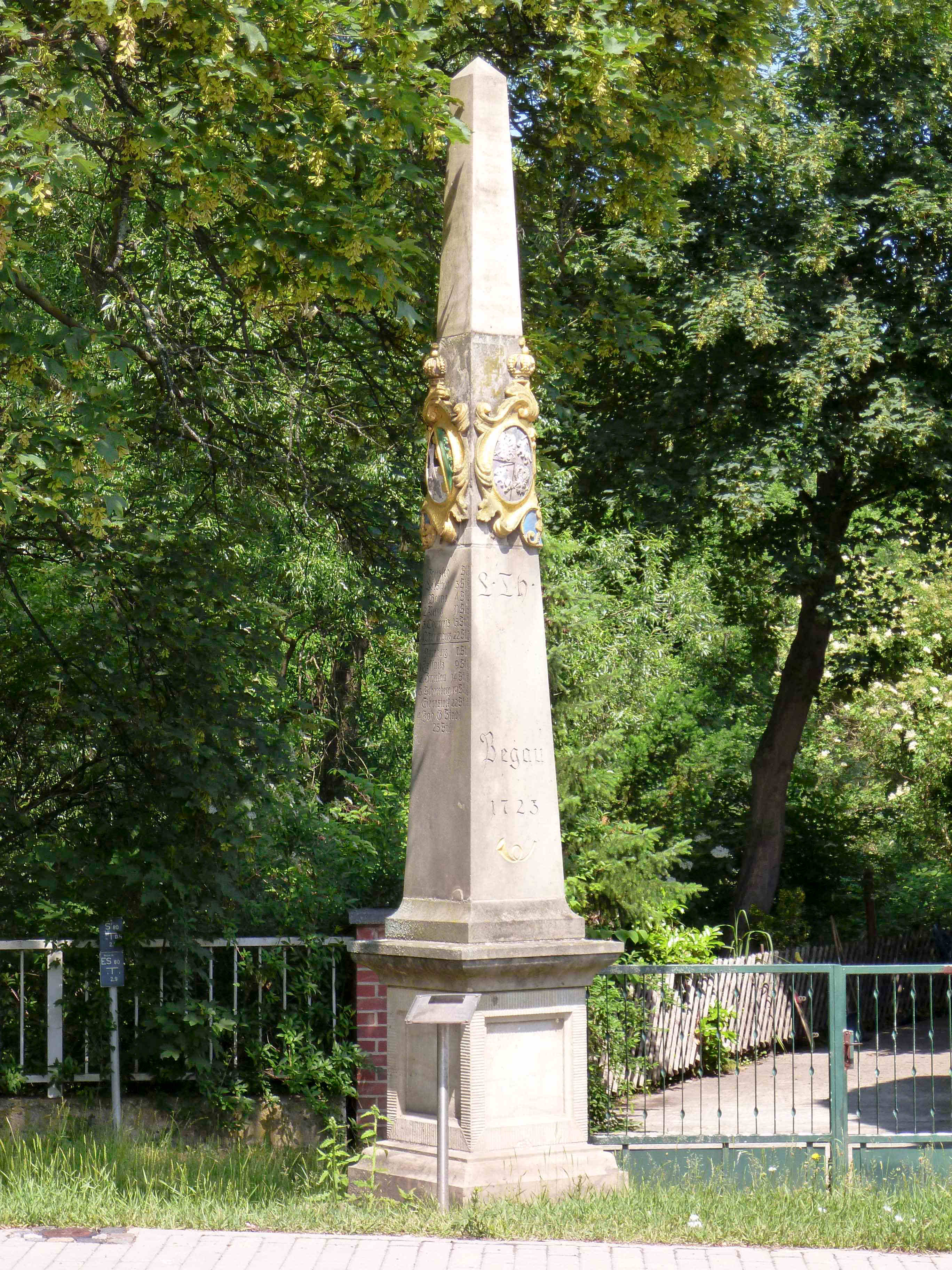 Kursächsische Postmeilensäule, Distanzsäule des sächsischen Poststraßennetz, Leipziger Vorstadt in Pegau